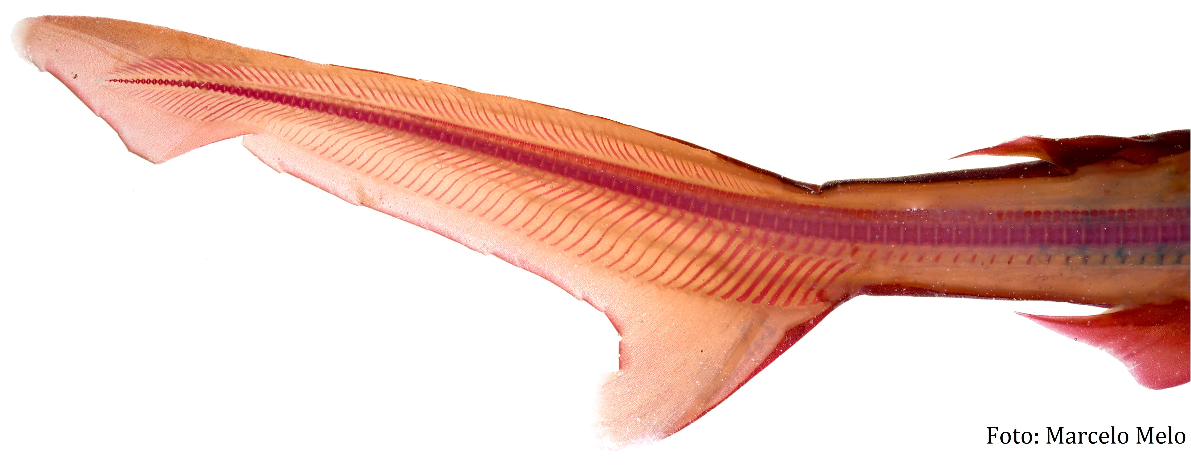 Nadadeira caudal heterocerca de tubarão diafanizada. Foto por Marcelo Melo, 2019